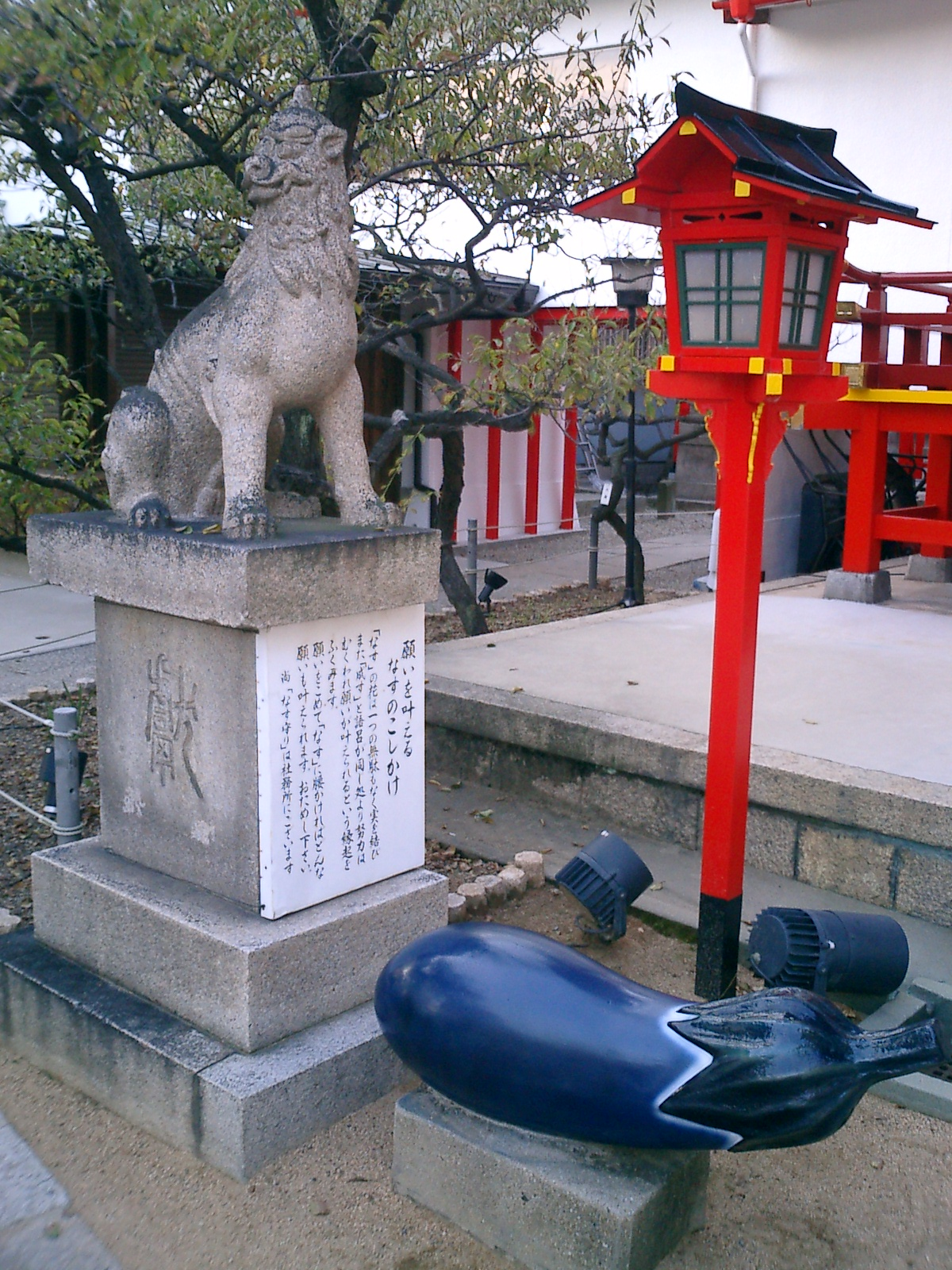 Nasu_no_koshikake